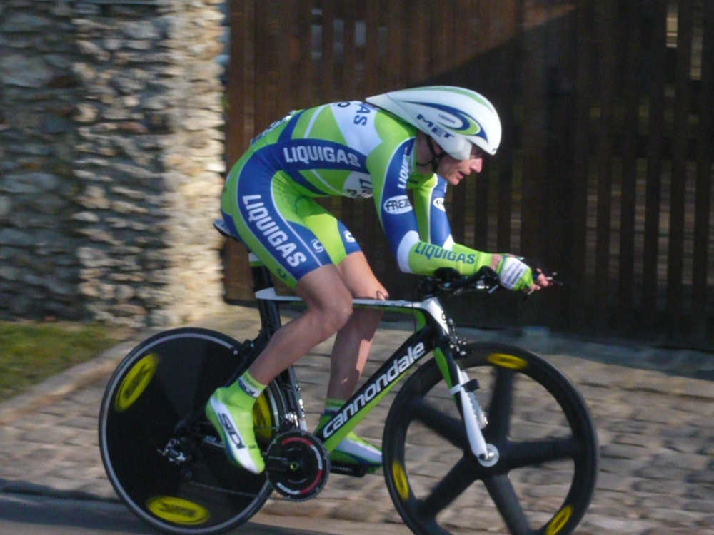 Kreuziger paris nice 2010